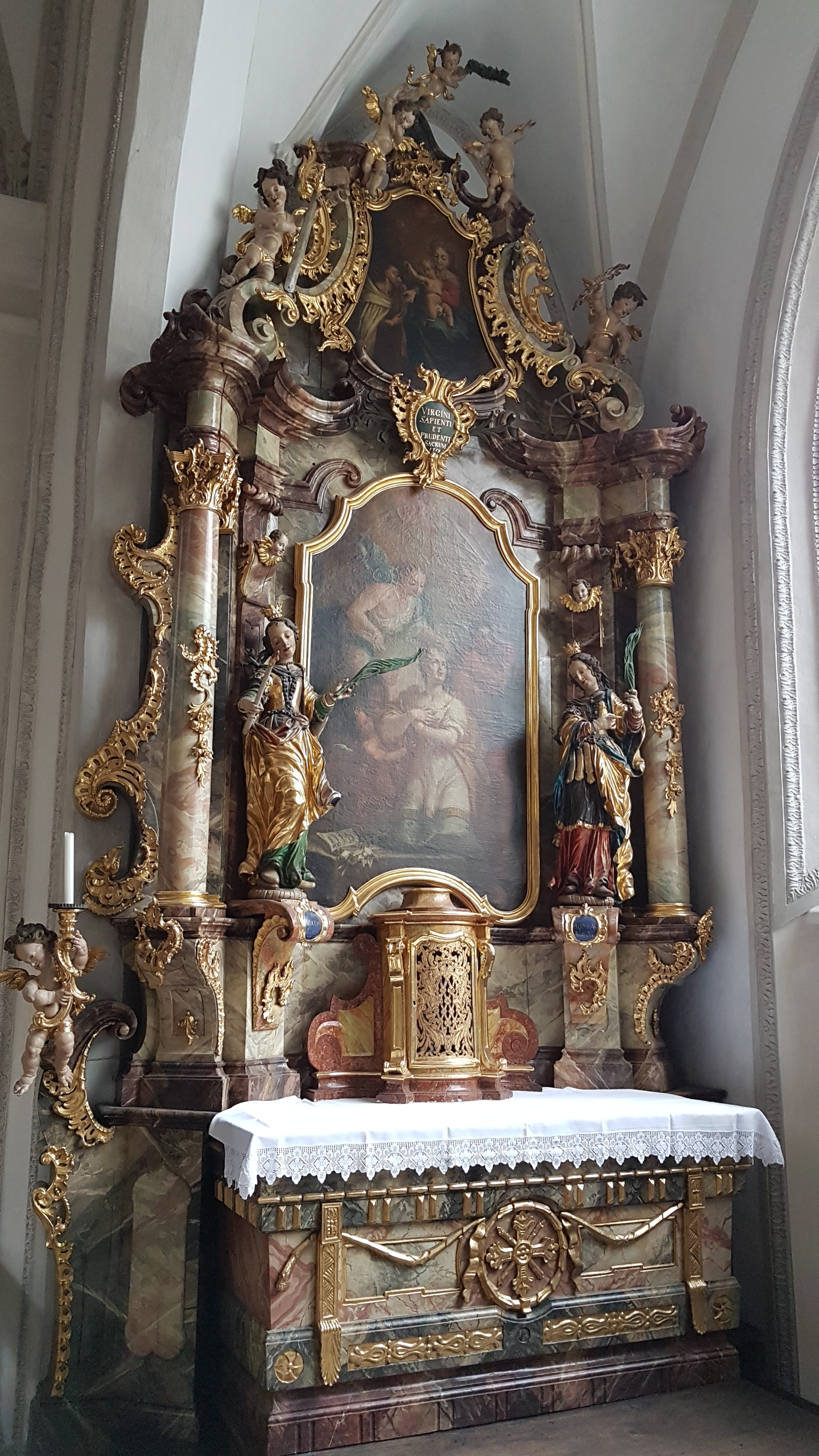 Mariä Himmelfahrt (Landsberg am Lech), 4. rechter Kapellenaltar von hinten.